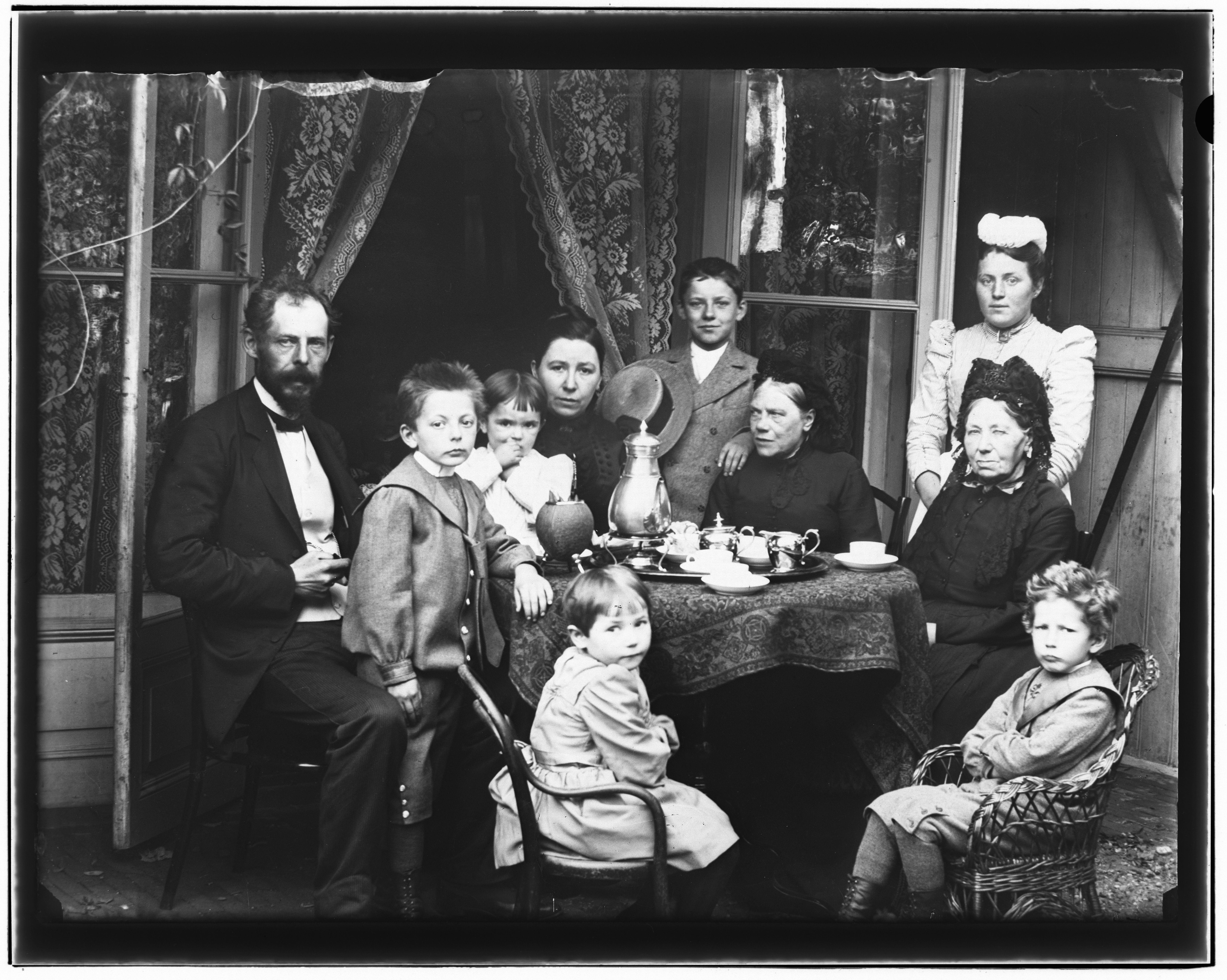 Beschrijving Gerrit Willem Vixseboxe (1856- ) Architect. Ontwierp o.a. de Muiderkerk. Gehuwd met Alyda Antonia Toorenbrug (1856- ). Het echtpaar had vijf kinderen en woonde van 15 mei 1891 tot 11 juni 1892 op het adres Witsenkade 1. Groepsportret met vrouw, kinderen, schoonmoeder, dienstbode. Documenttype foto Vervaardiger Olie, Jacob (1834-1905) Collectie Collectie Jacob Olie Jbz. Inventarissen Afbeeldingsbestand 10019A001801 Generated with Dememorixer